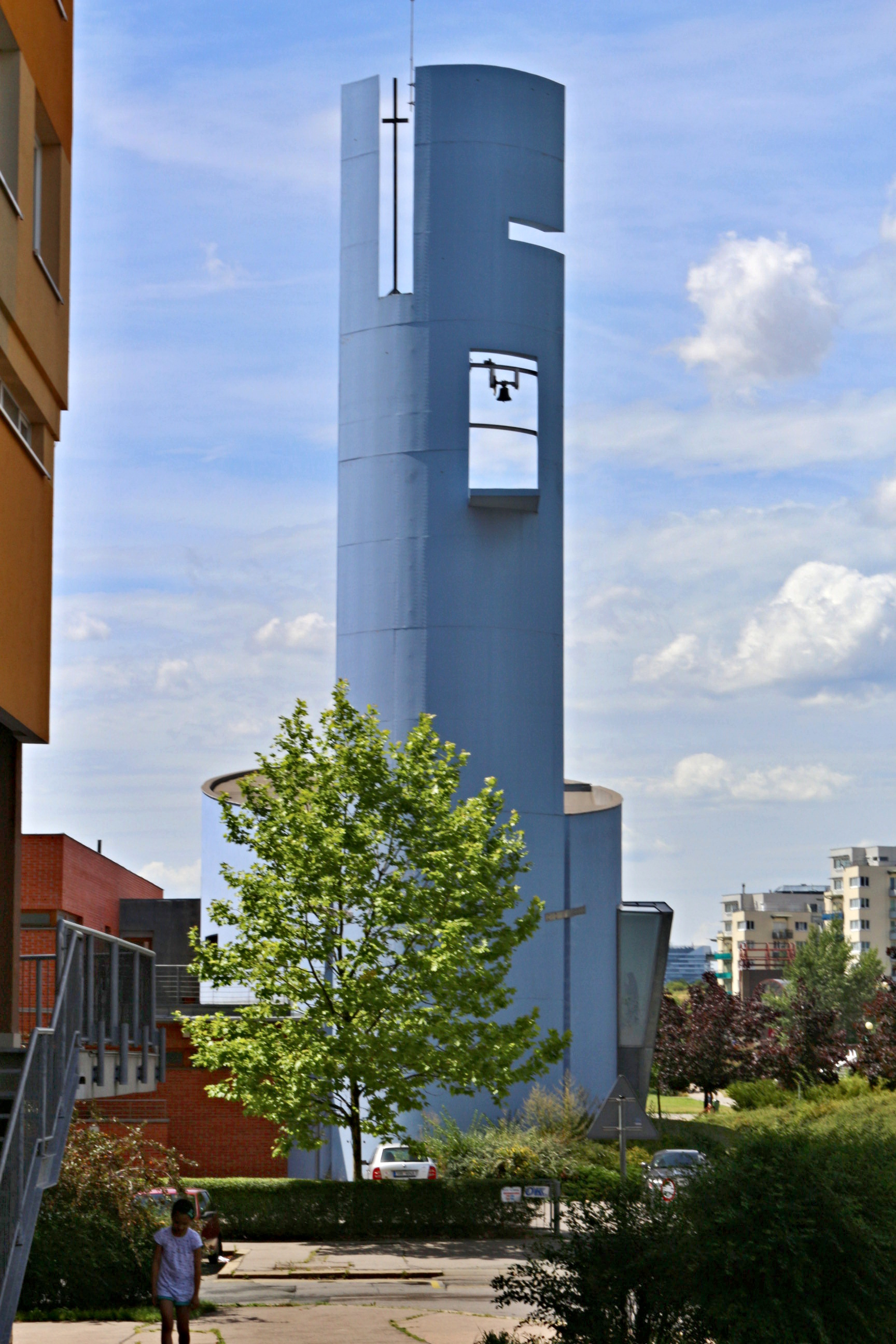 Kostel a centrum sv. Prokopa v Praze 13-Stodůlkách